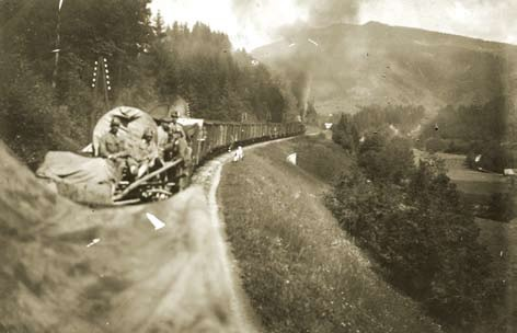 Odhod vojakov 26. strelskega polka proti Galiciji